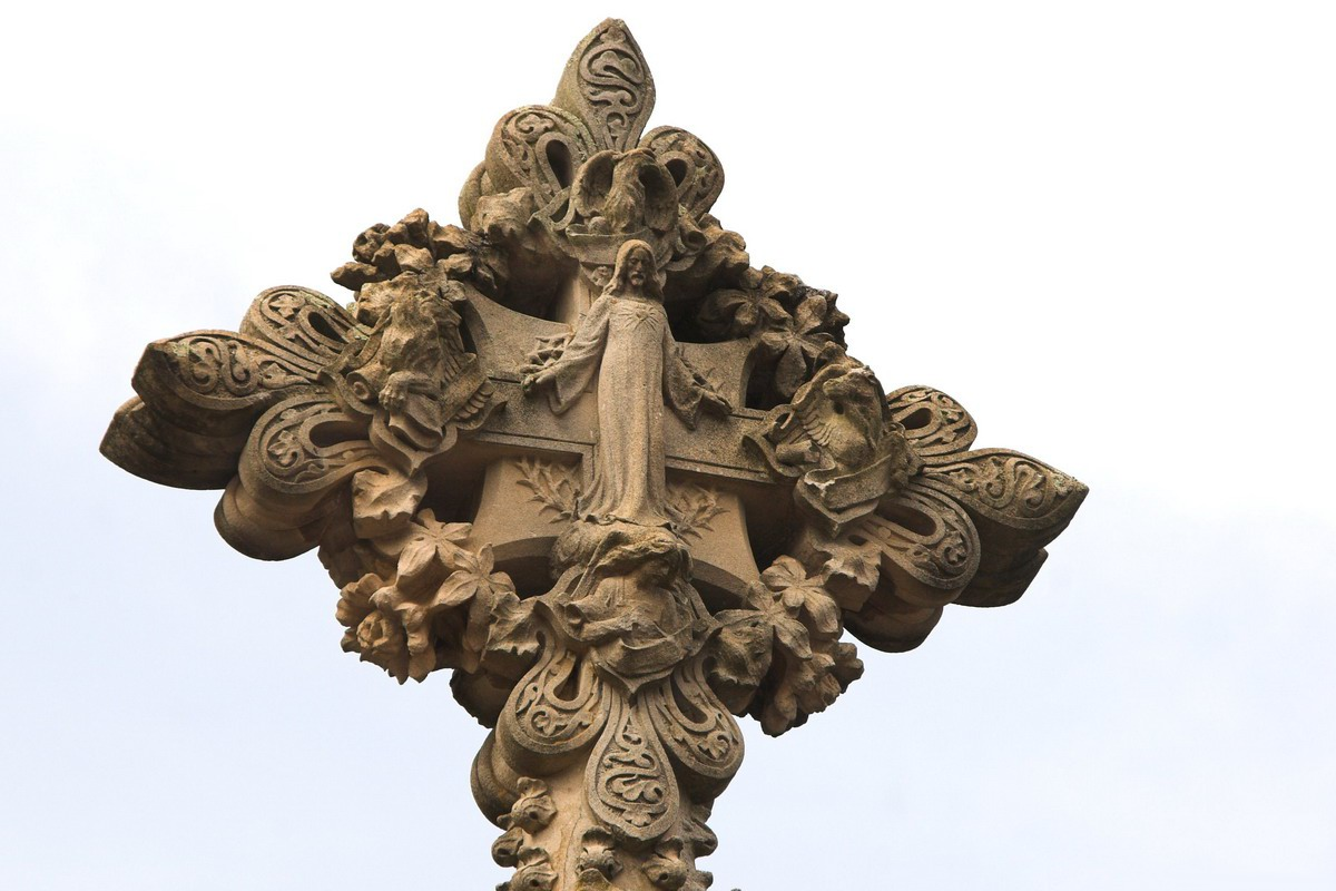 Tetramòrf a dalt d'un creu de terme en el camí d'accés a Sant Pere del Bosc (Lloret de Mar-La Selva-Catalunya), obra dissenyada per Josep Puig i Cadafalch 1898. Les escultures son d'Eusebi Arnau.